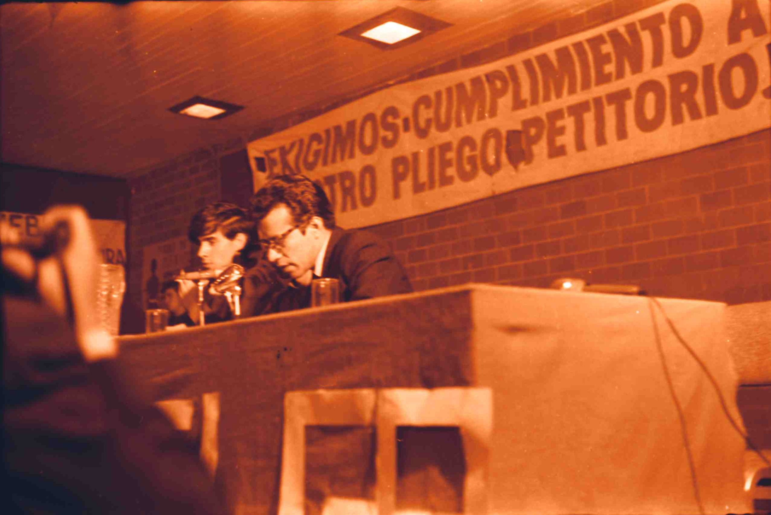 Luis T. Cabeza de Vaca and Marcel·lí Perelló at a Press conference. Mexico, 1968